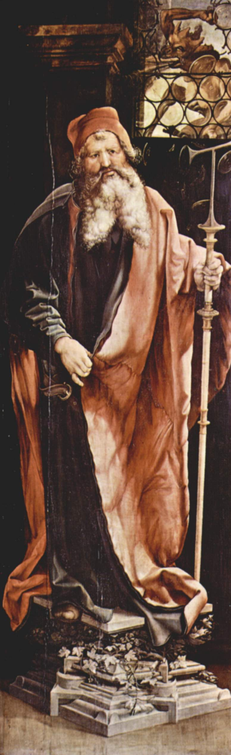 detail